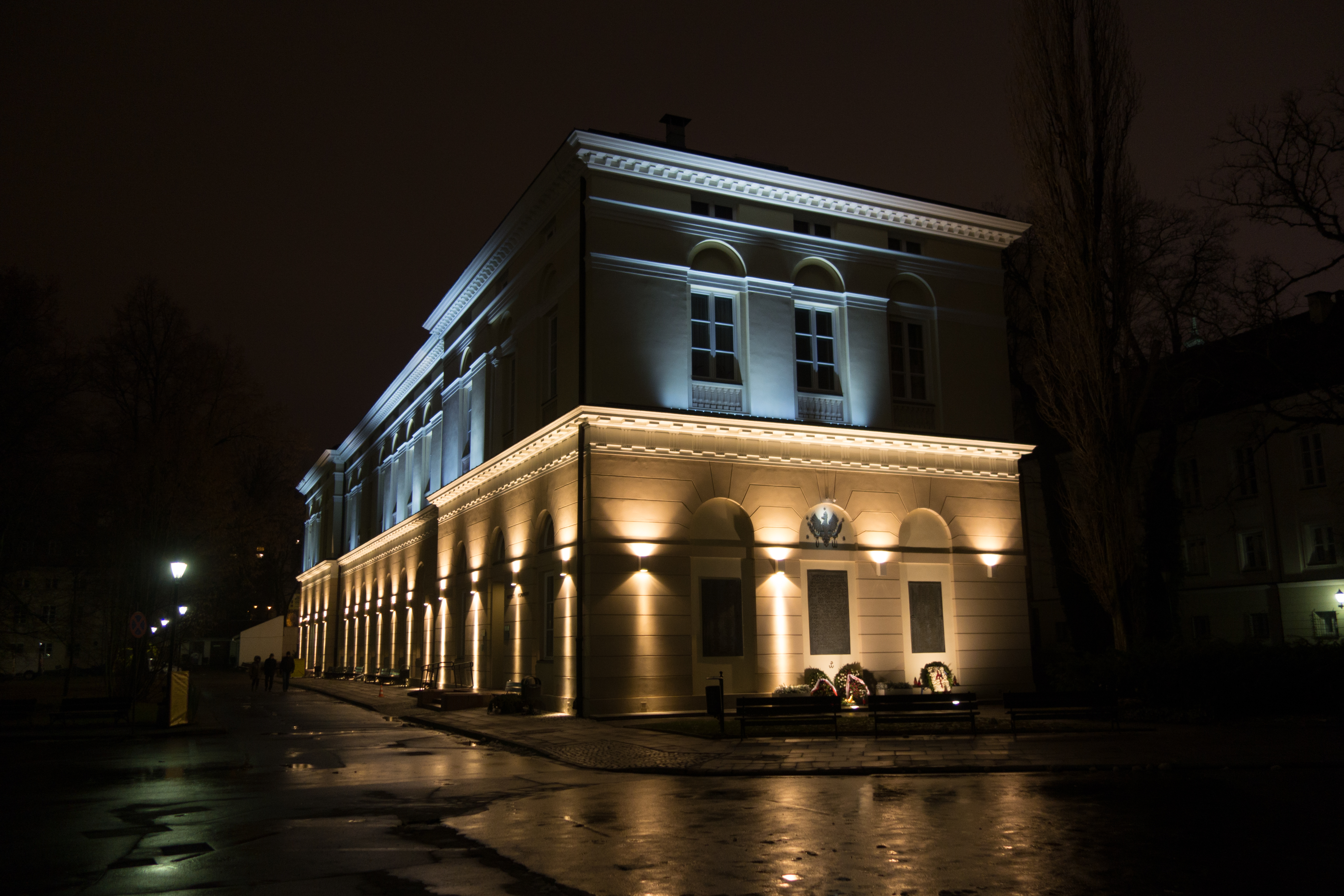 Warsaw 2015